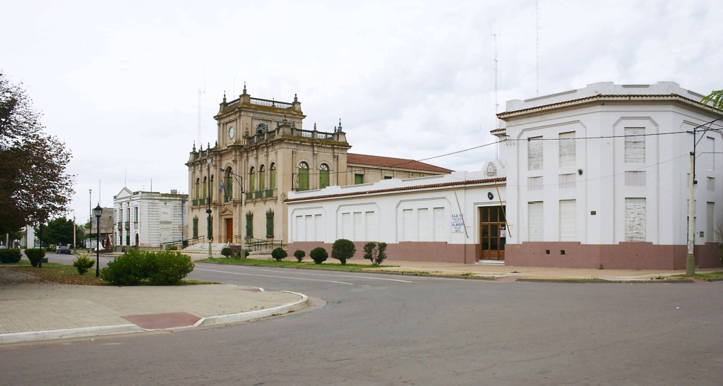 Comisaría, Palacion Municipal, Escuela Nº 1 (de izquierda a derecha), América, Rivadavia, Buenos Aires, Argentina